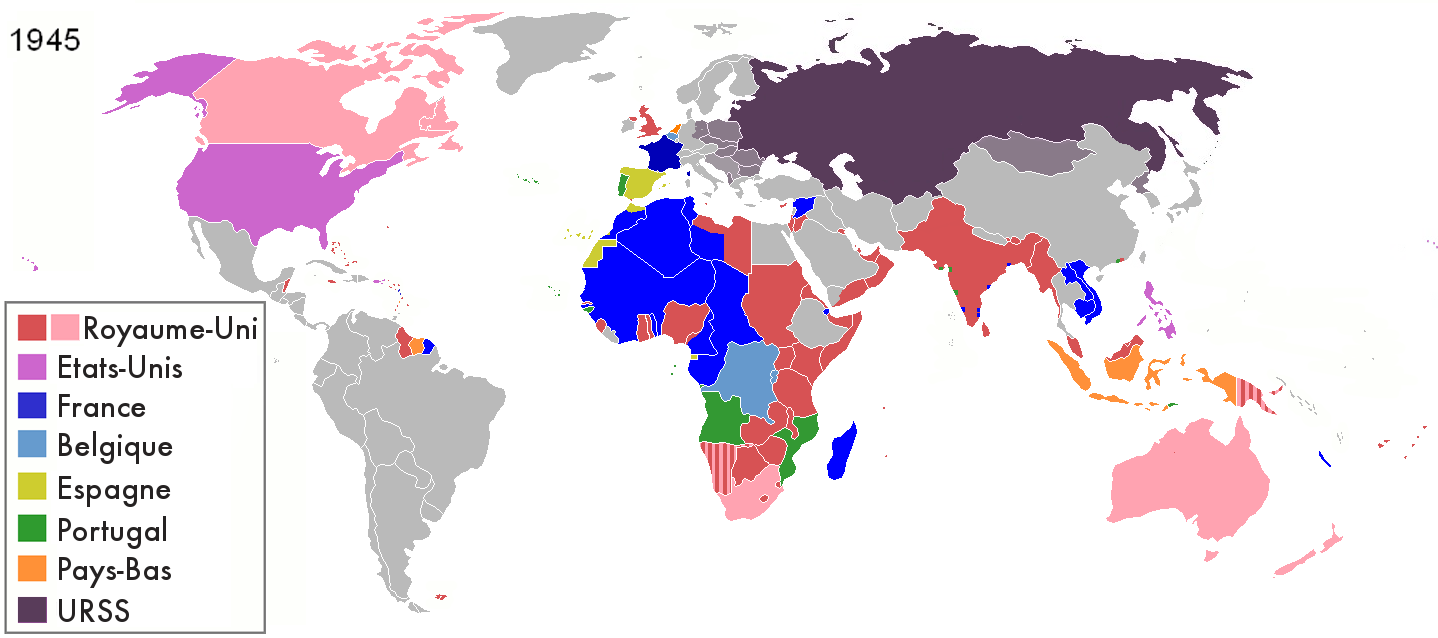 Les couleurs représentent les colonies des diverses pays en 1945 et les frontières coloniales de l'époque. Version Française.